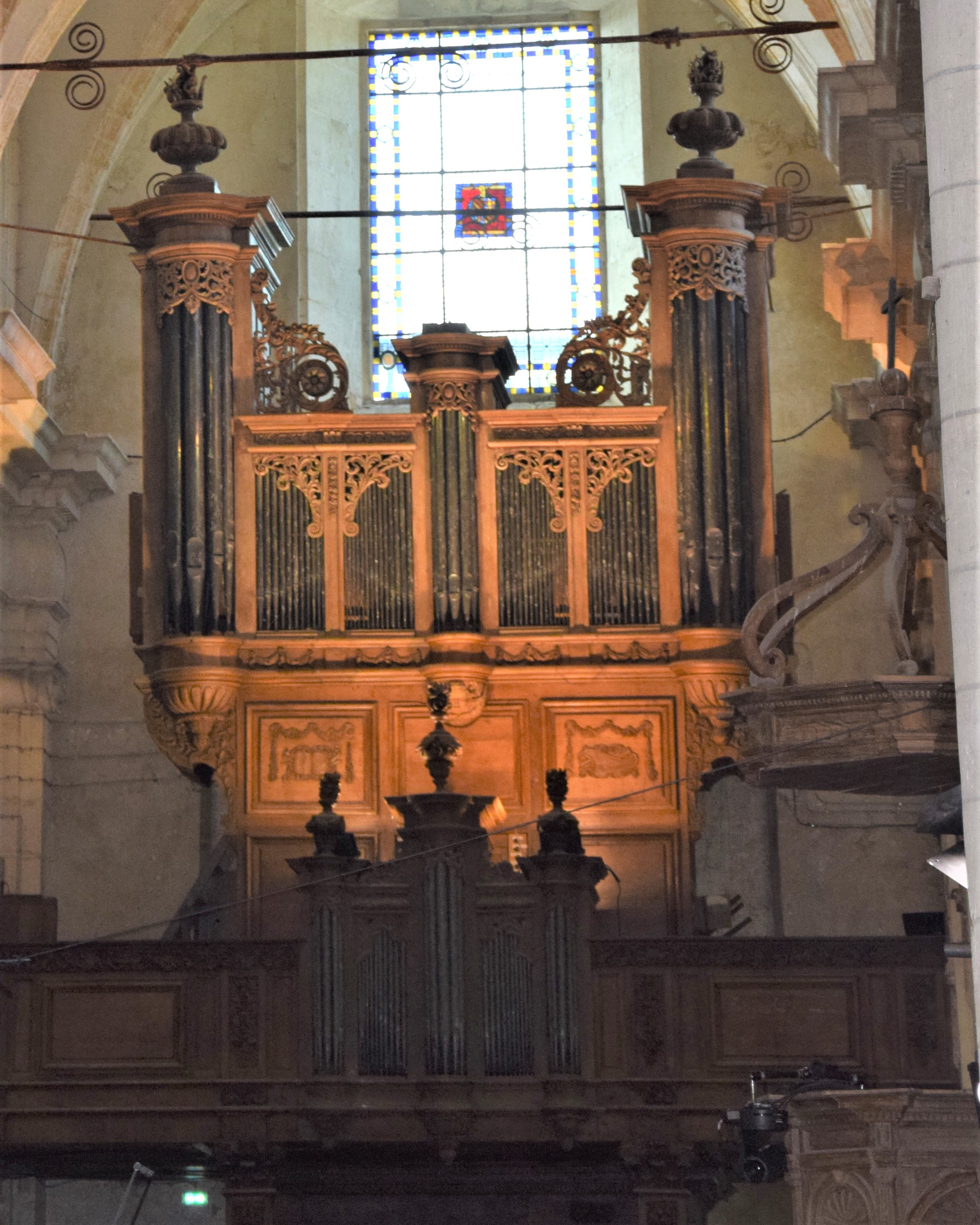 Saint-Michel-en-Thiérache (Aisne, France), dans l'abbatiale, orgue de Jean Boizard en 1716, très bien conservé et restauré une première fois en 1980 par Haerpfer-Erman et une deuxième fois en 1997 par Georg Westenfelder.